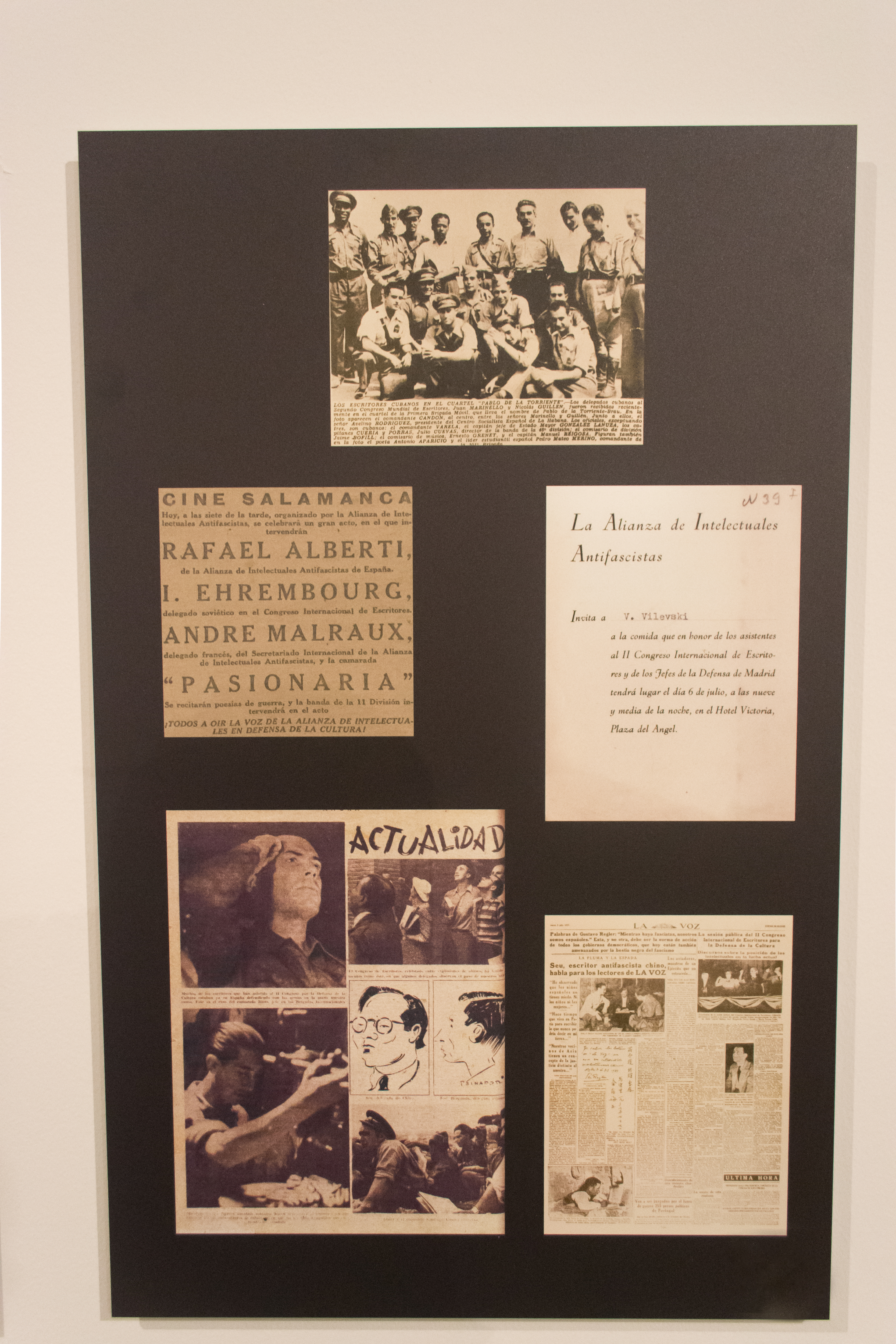 Noticias sobre la Alianza de Intelectuales Antifascistas para la Defensa de la Cultura. Exposición Por la defensa de la Cultura en el Centro del Carmen de Valencia.